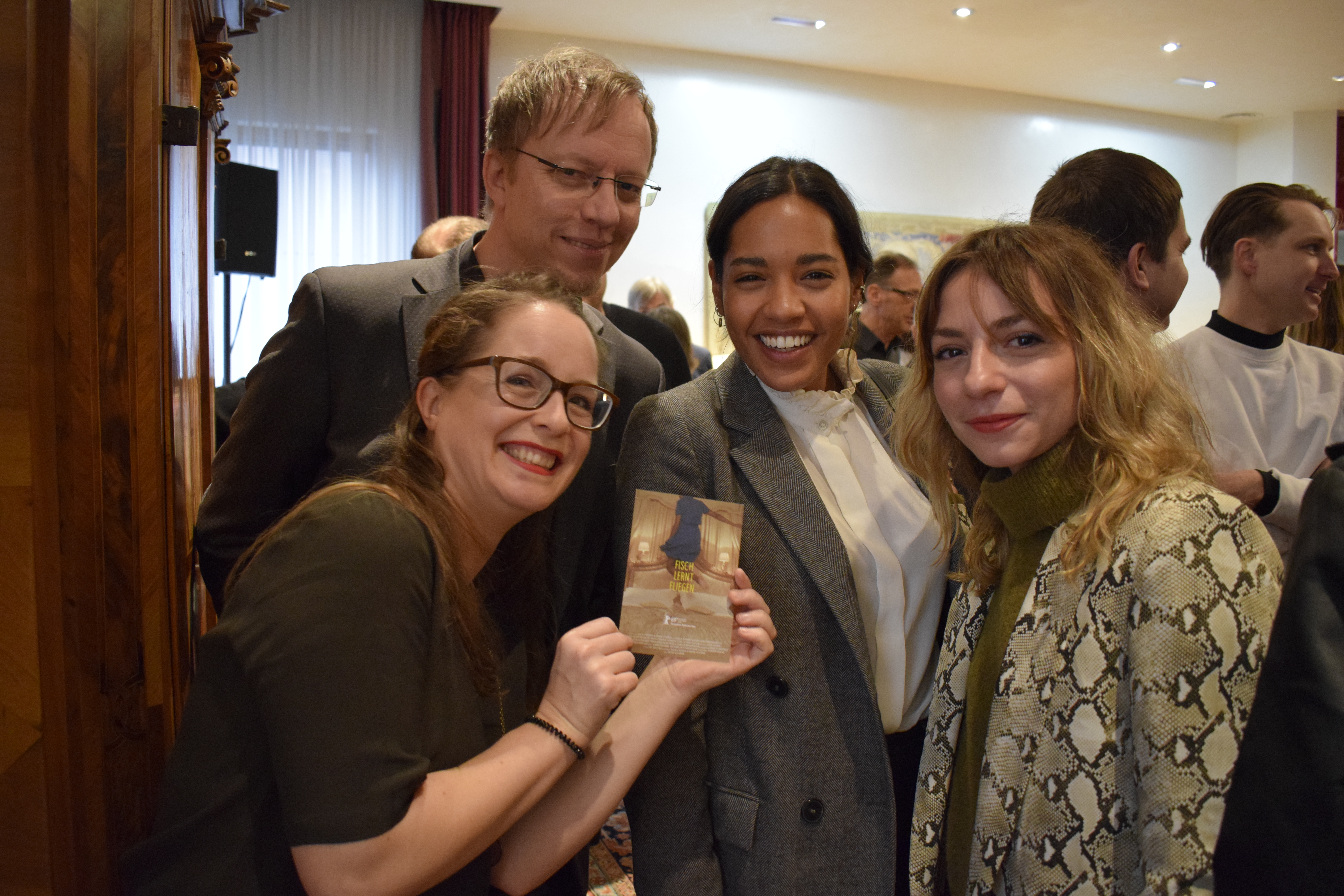 10.02.2019: Berlinale-Empfang an der Österreichischen Botschaft Berlin